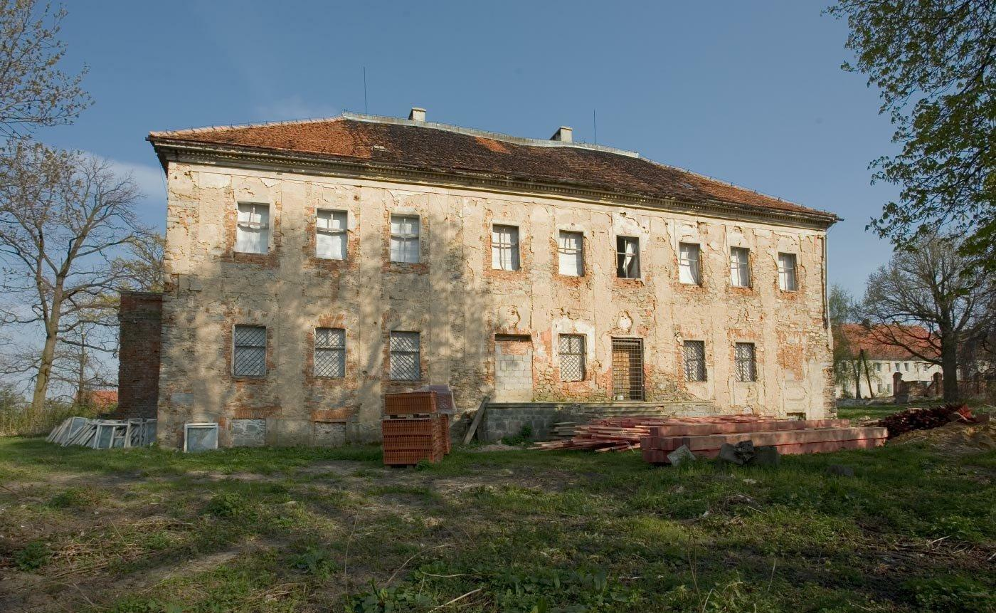 Elewacja tylna. W porównaniu do stanu sprzed pięciu lat, uwiecznionego przez Thora niewiele się tu zmieniło. Choć nadzieja w drewnie na konstrukcję dachu i dachówce, które pojawiły się niedawno.